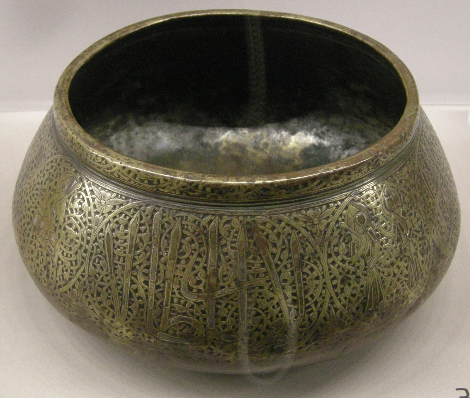 Iran, coppa di rame inciso e ageminato con argento, xiv sec